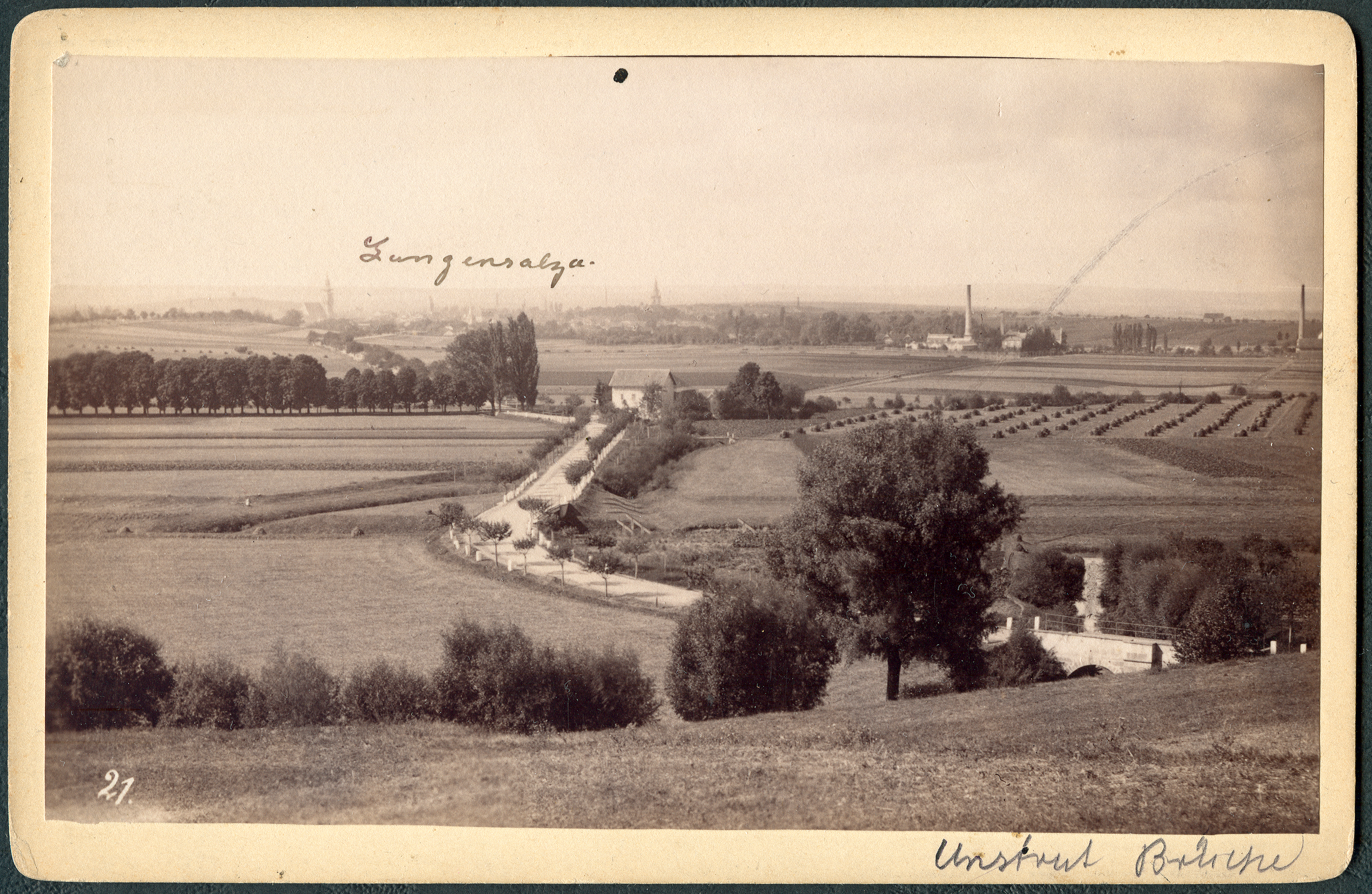 Handschriftlich auf dem Negativ mit der Nummer 21 nummerierte Landschaftsaufnahme des Fotografen Christian Gottfried Bregazzi im Kabinettformat mit einem Blick von einer Anhöhe über die während der Schlacht bei Langensalza wichtige Brücke über die Unstrut und weiter über nach dem im Hintergrund zu erkennenden Gebäuden des (heutigen) Ortes Bad Langensalze ...